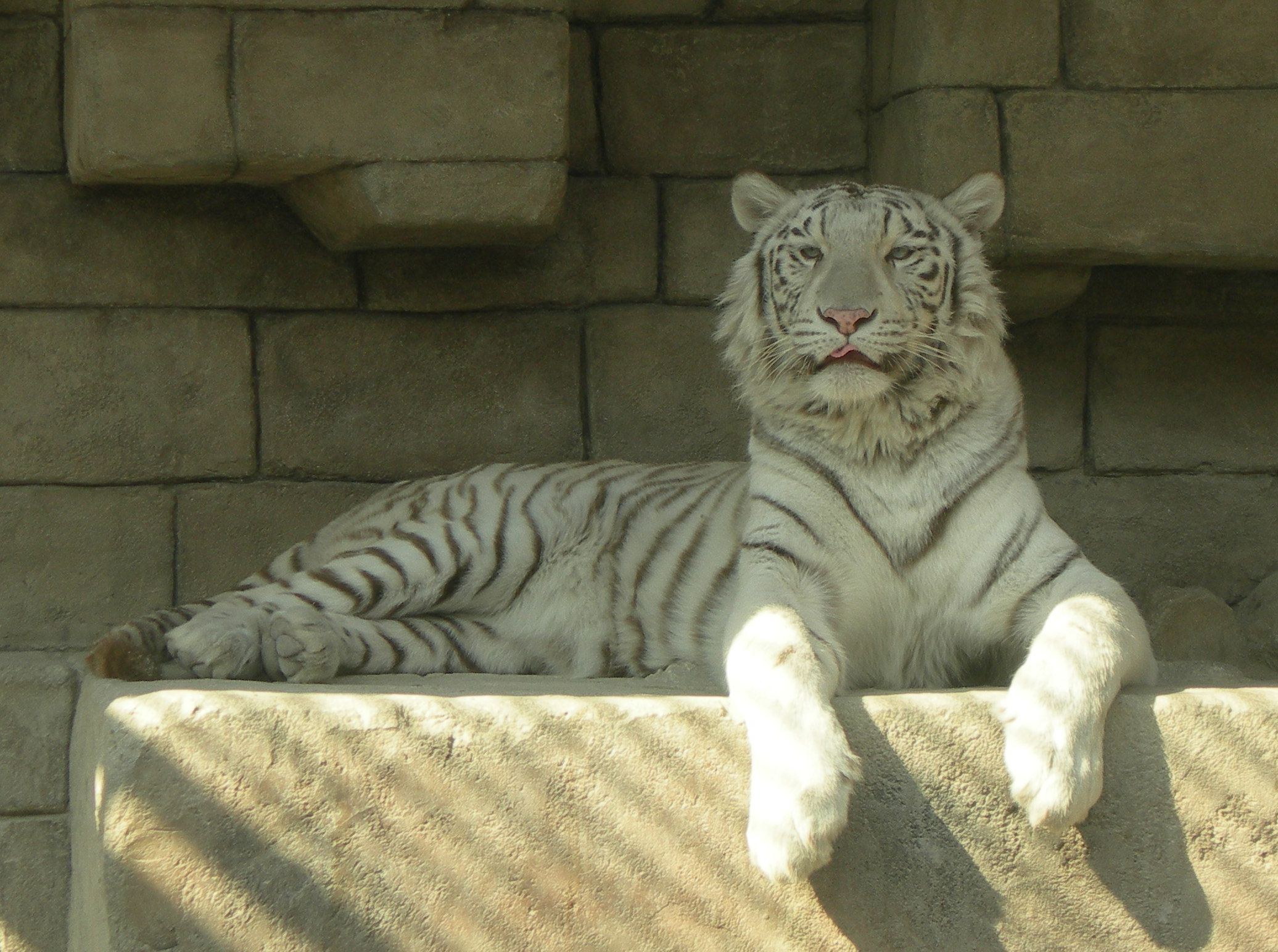 東武動物公園で飼育されているホワイトタイガー（インドに生息するベンガルトラの白変種）